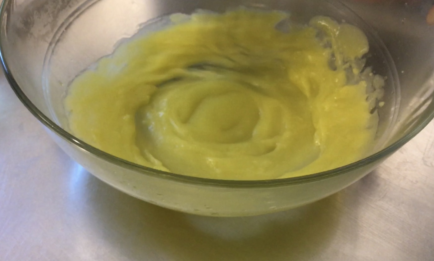 Incorporació d'oli a la mescla d'aigua i carragenina iota.